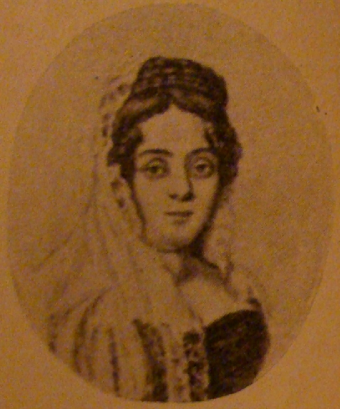 Retrato de Juana Pueyrredón de Sáenz Valiente, patricia argentina